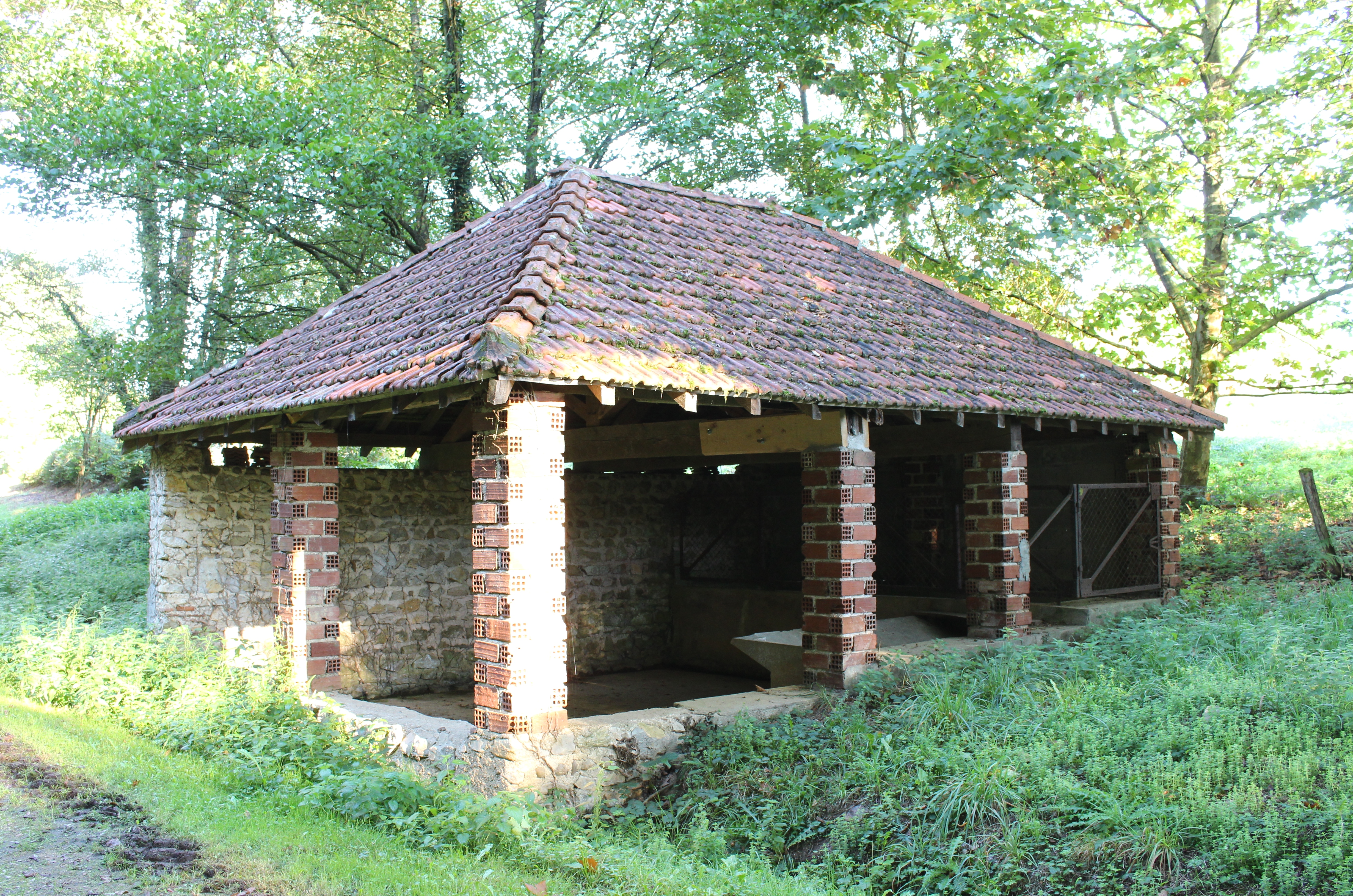 Lavoir de Laslades (Hautes-Pyrénées)